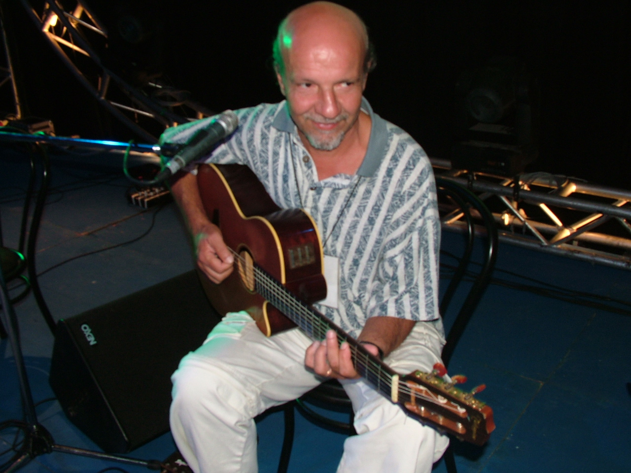 Buenos Aires Tango